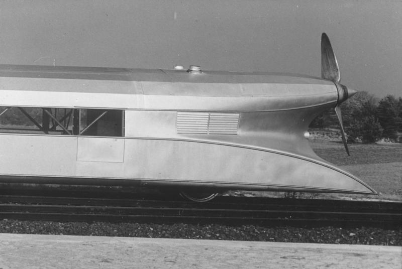 Die erste Propeller-Eisenbahn! Das Heck des Propeller-Triebwagens mit dem Propellerantrieb, welcher dem Fahrzeug eine Stundengeschwindigkeit von 180 km. gibt.